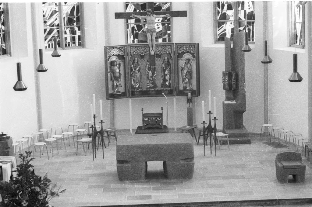 Altar und Ausstattung vom Berliner Bildhauer Paul Brandenburg.